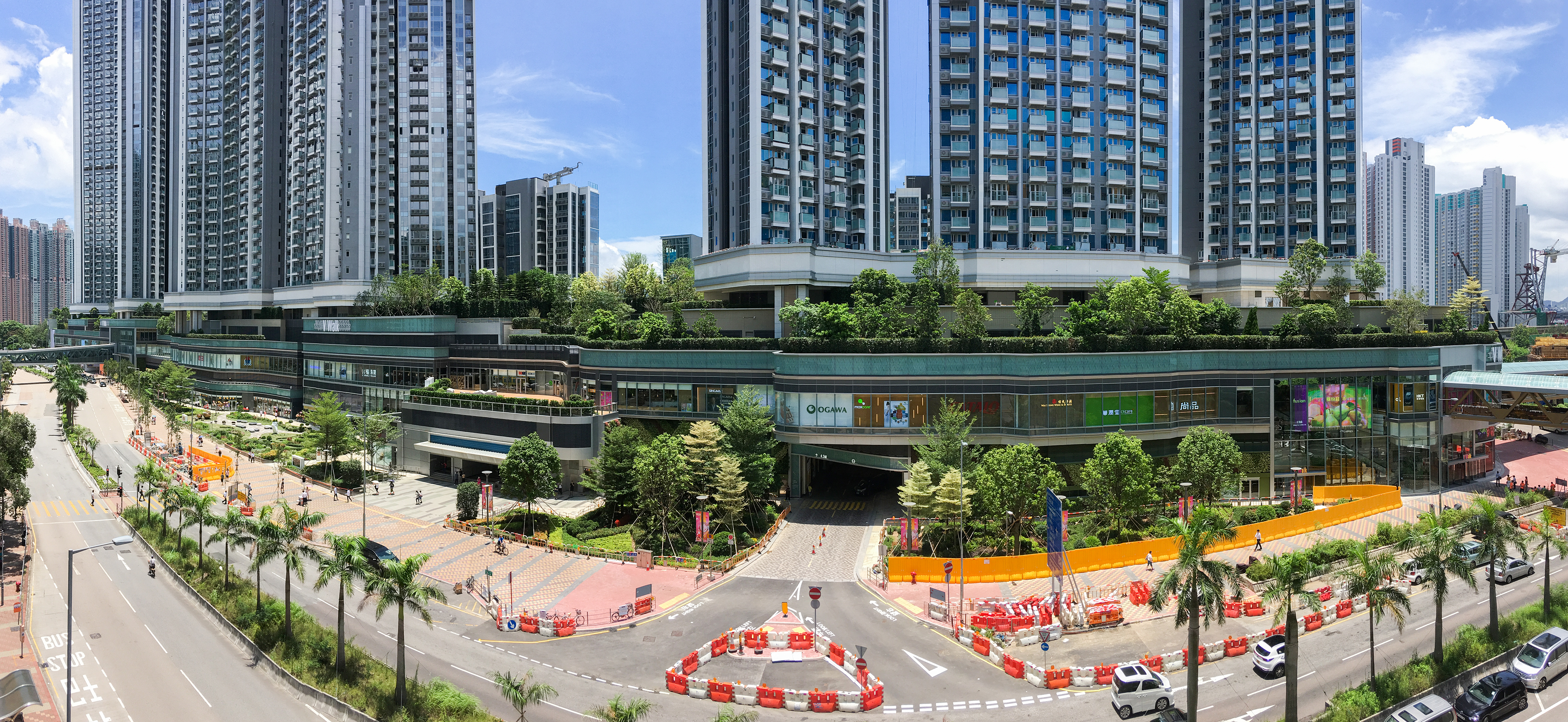 V Walk Overview pano